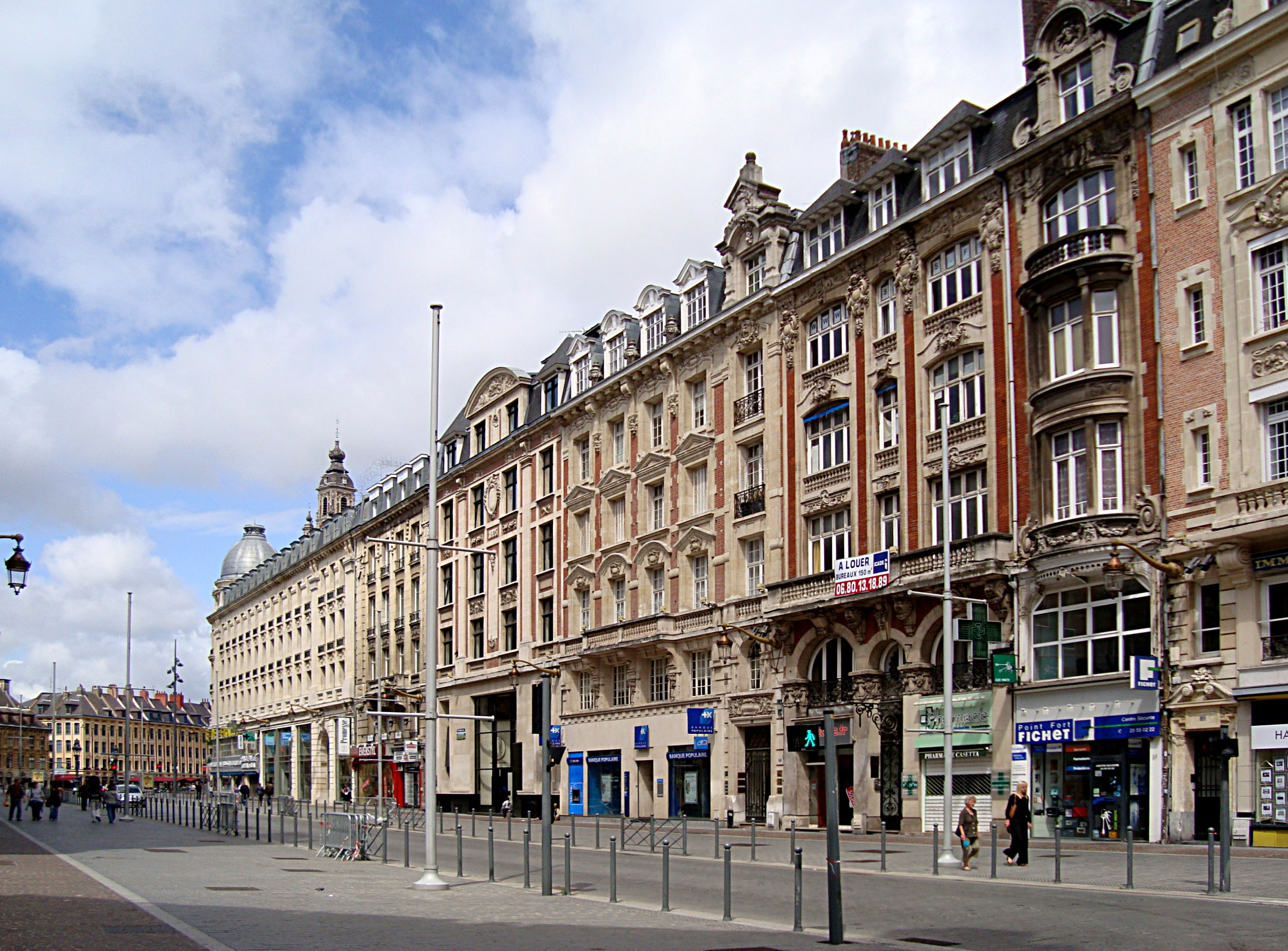 La rue Faidherbe à Lille (Nord), percée en 1860 pour relier la gare au centre ville.